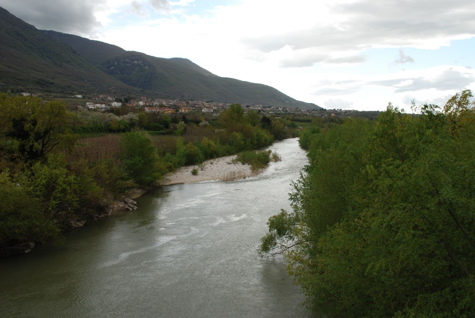 Panorama del paese dal fiume Calore